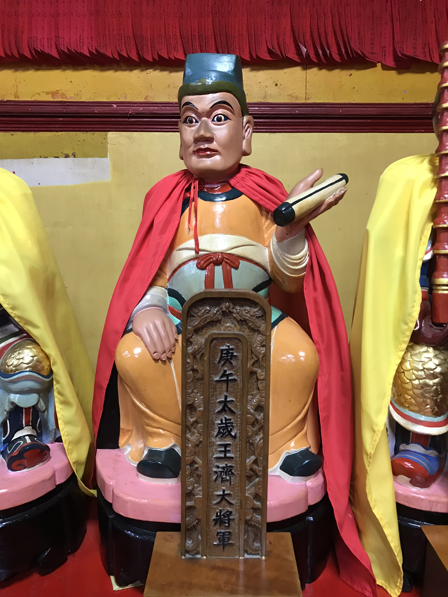 庚午太歲王濟大將軍神像